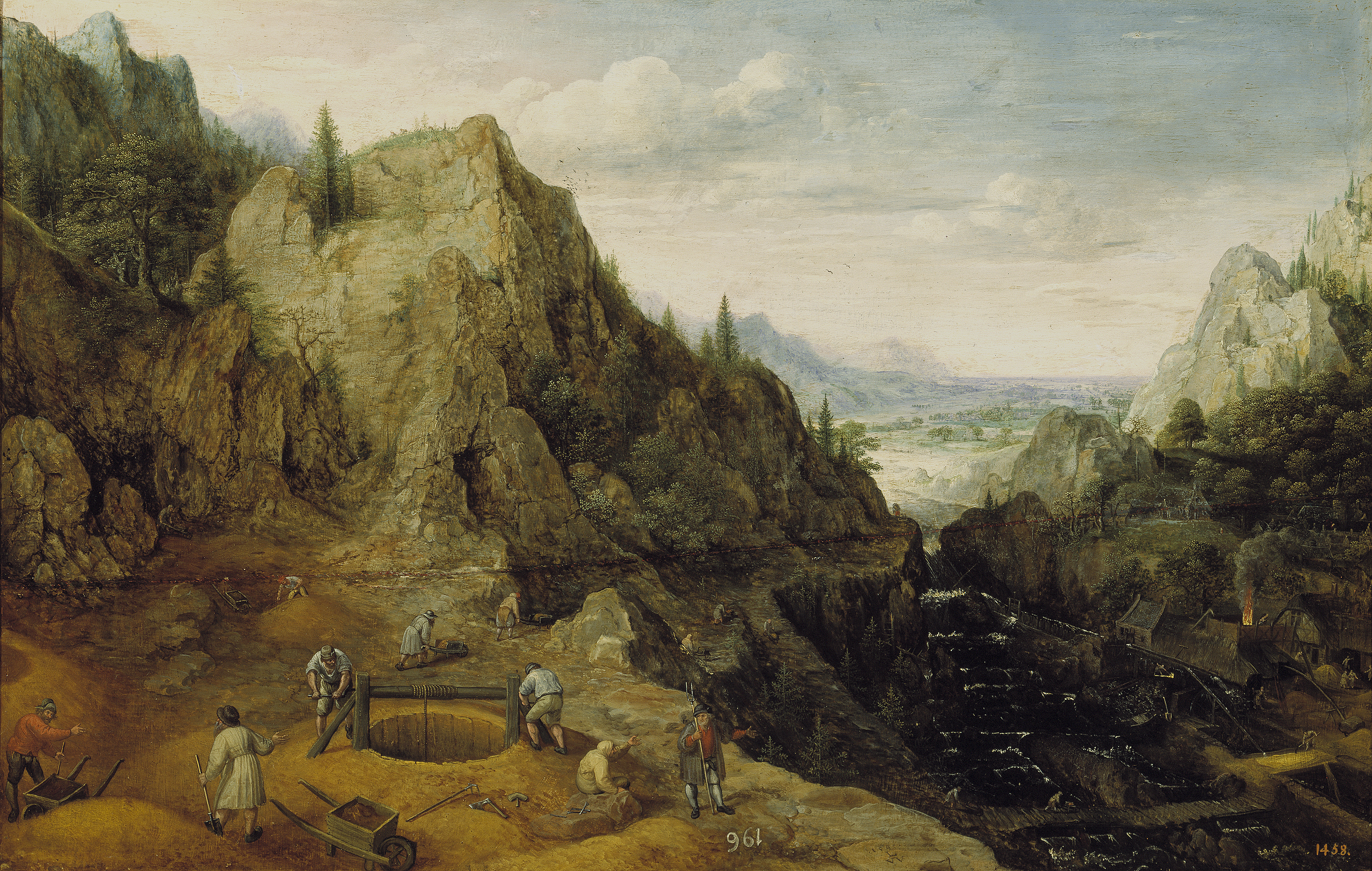 Paisaje con ferreríaslabel QS:Les,"Paisaje con ferrerías"